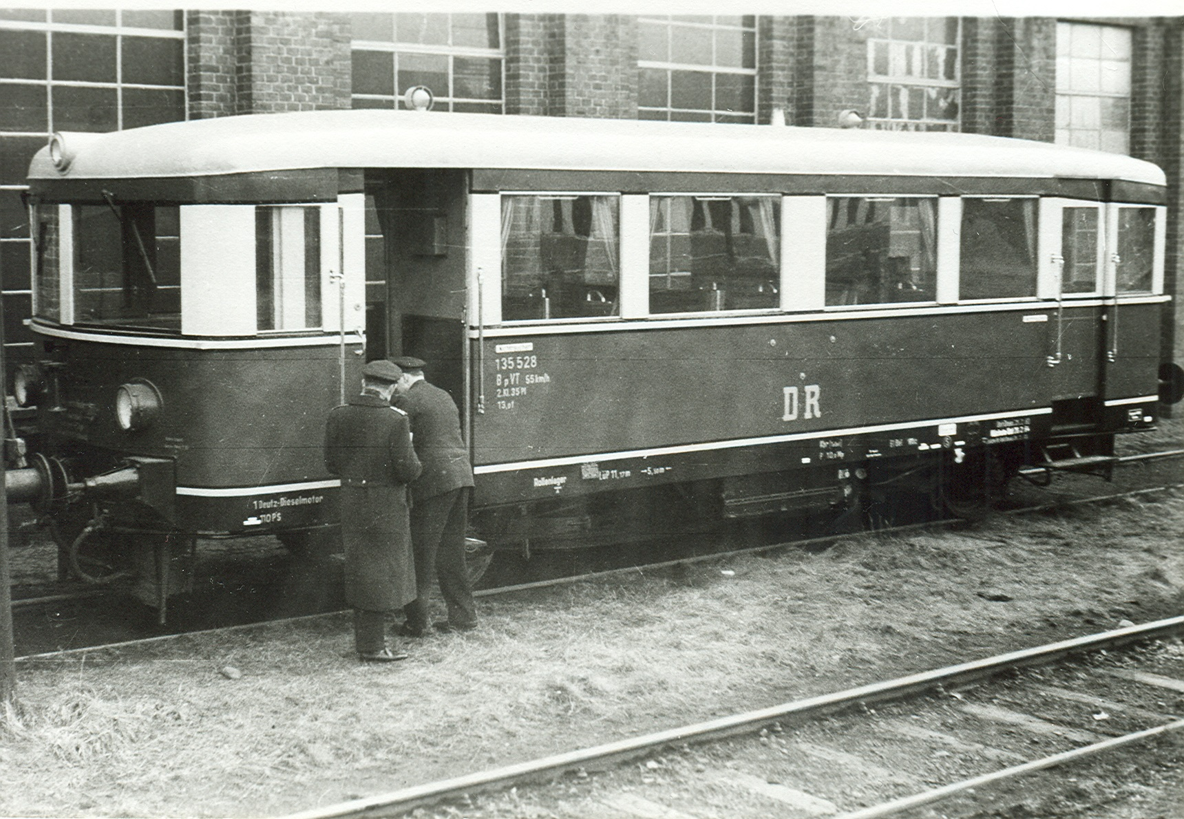 VT 135 528 auf einer historischen Aufnahme von Georg Otte im RAW Dessau.